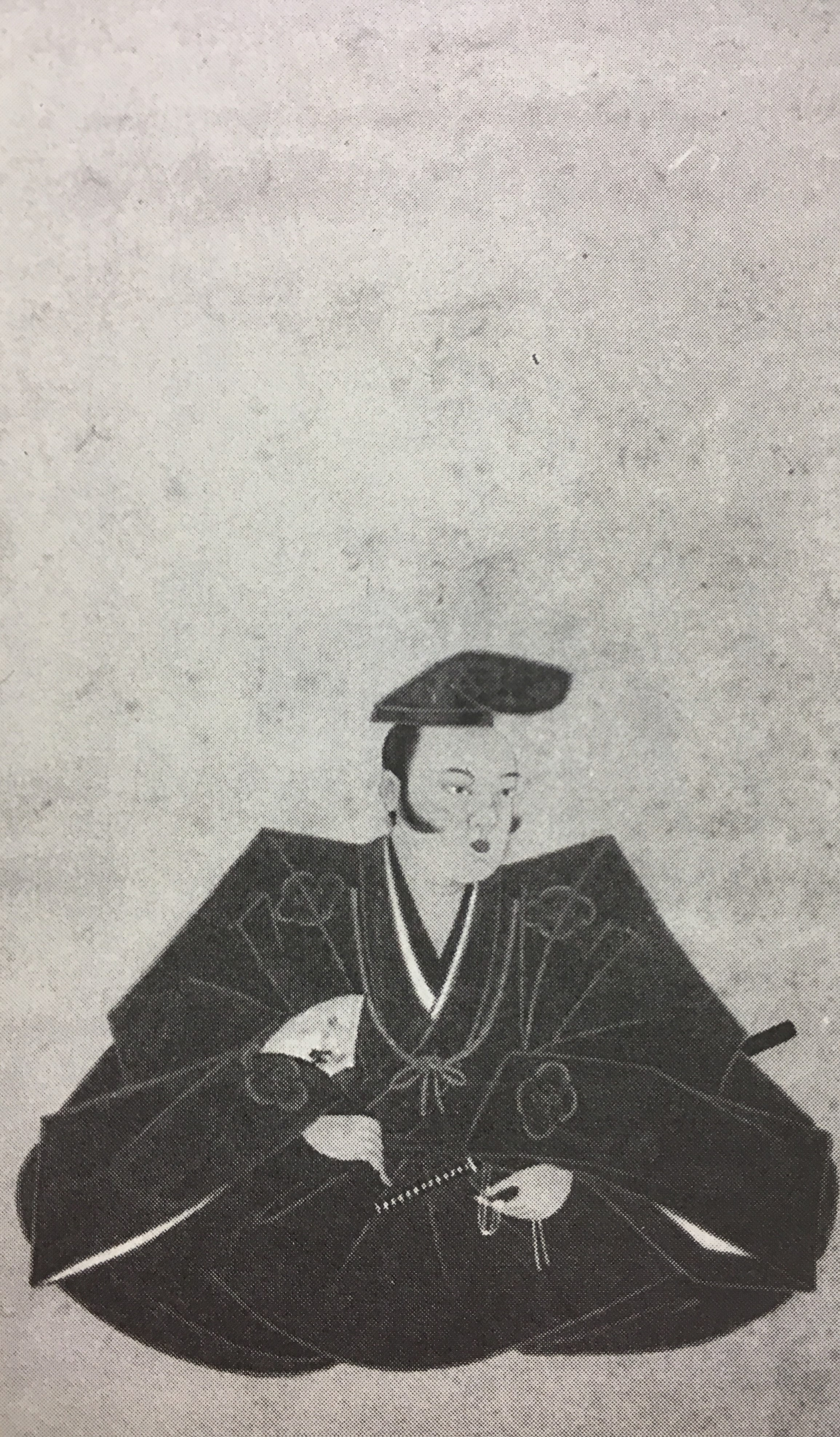 伊東義益の肖像(モノクロ)。